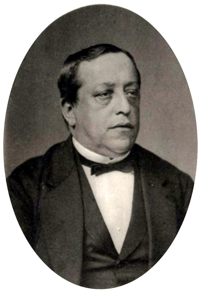 C.H.C Grinwis door G.L. Mulder, ca. 1875